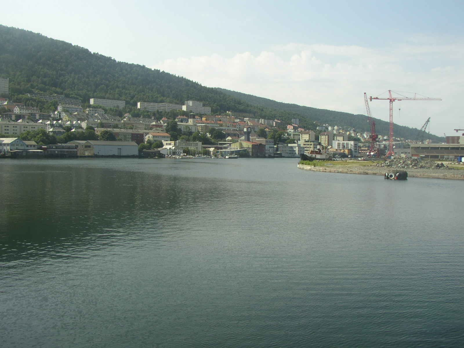 Bergen, rives sud-ouest du canal Solheimsviken, le 30/07/06. Photo personnelle.